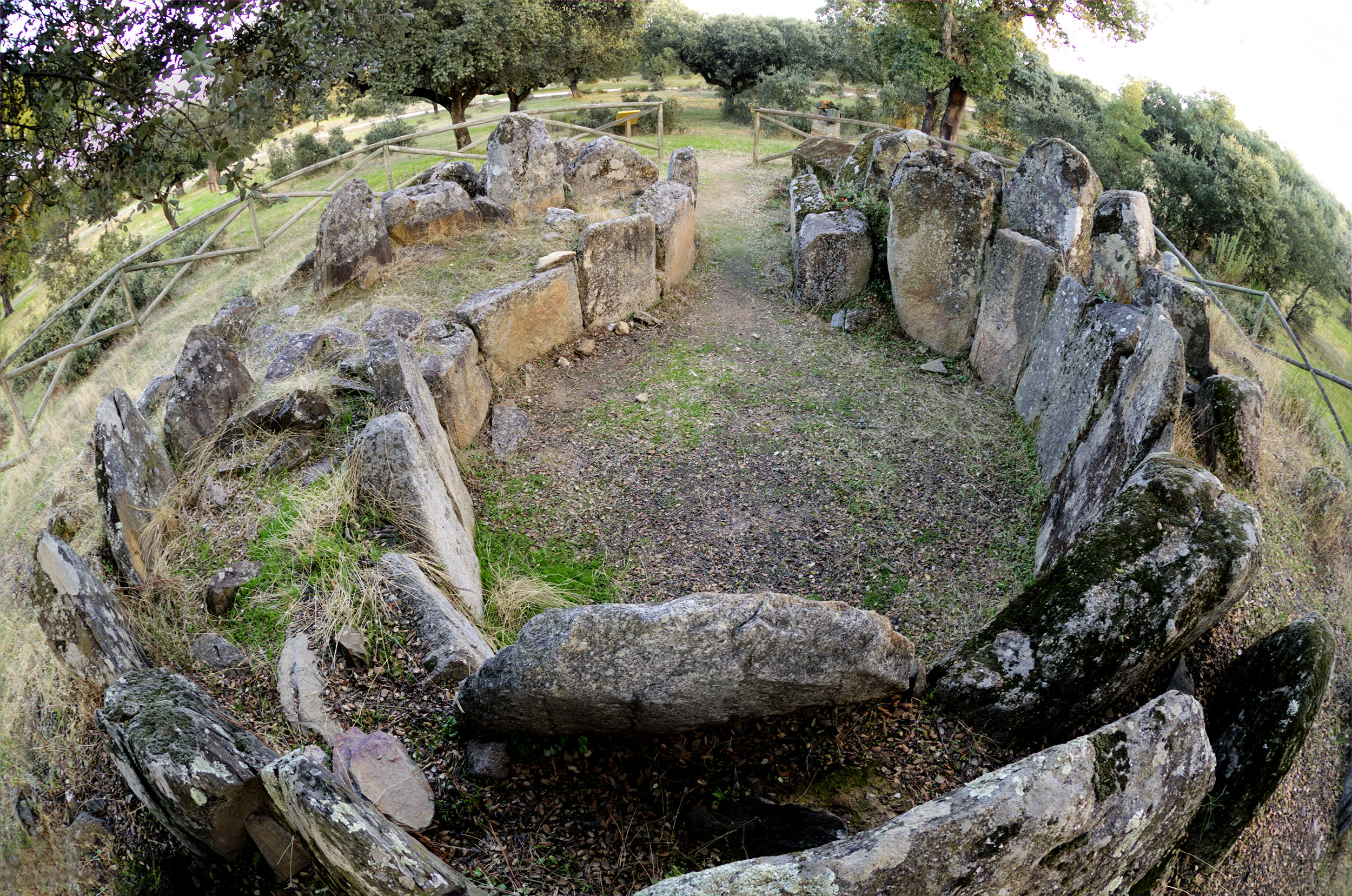 Dolmen del Tremedal, dehesa boyal de Montehermoso, provincia de Cáceres, España